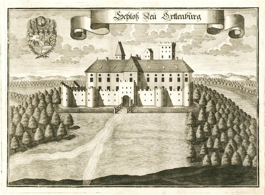 Schloß Neu Orttenburg, aus: Historico-Topographica Descriptio. Dritter Theil, 1723